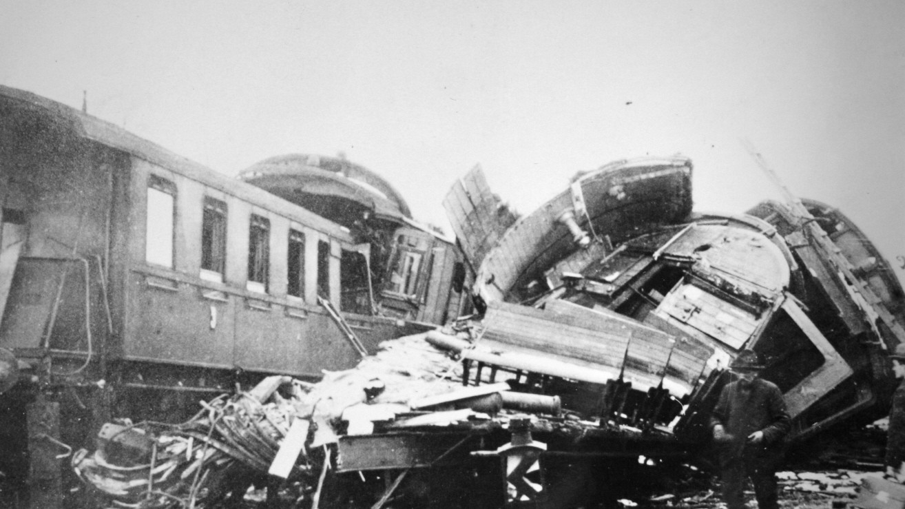 Photo - Eisenbahnunfall von Nannhofen